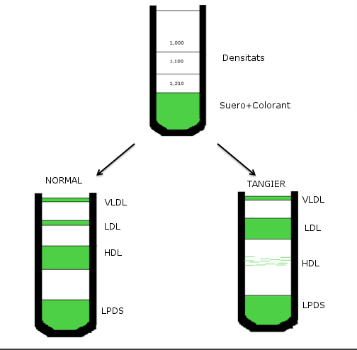 Comparació de la proporció de diferents lipoproteïnes en sl sèrum sangini de una persona sana amb una que té la malaltia de Tangier